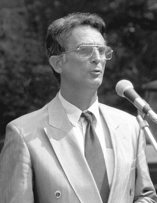 Cristian Gațu, fost secretar de stat în Ministerul Tineretului și Sportului, 19 august 1992